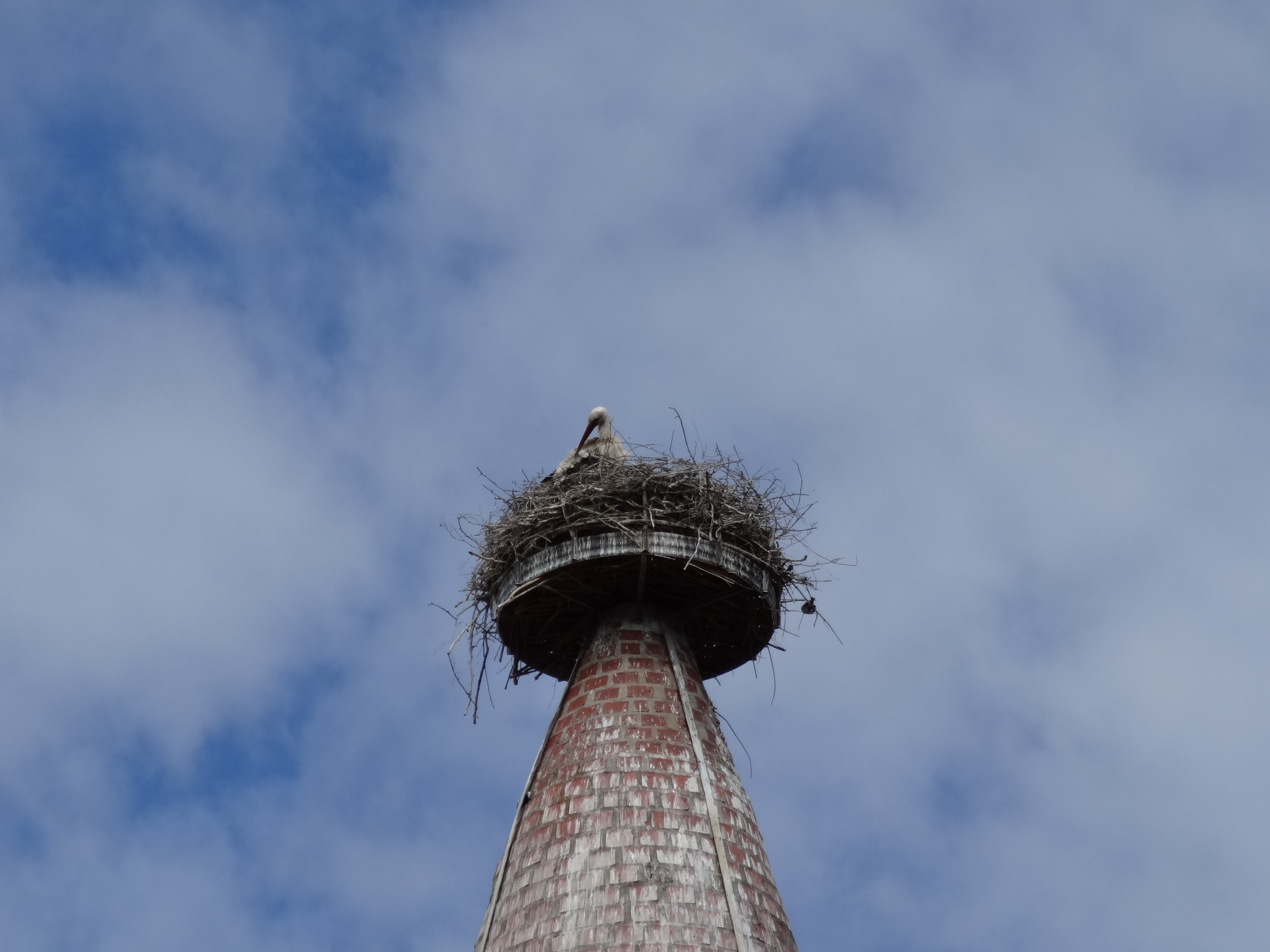 Altlandsberg, eine Stadt im Landkreis Märkisch-Oderland, Brandenburg